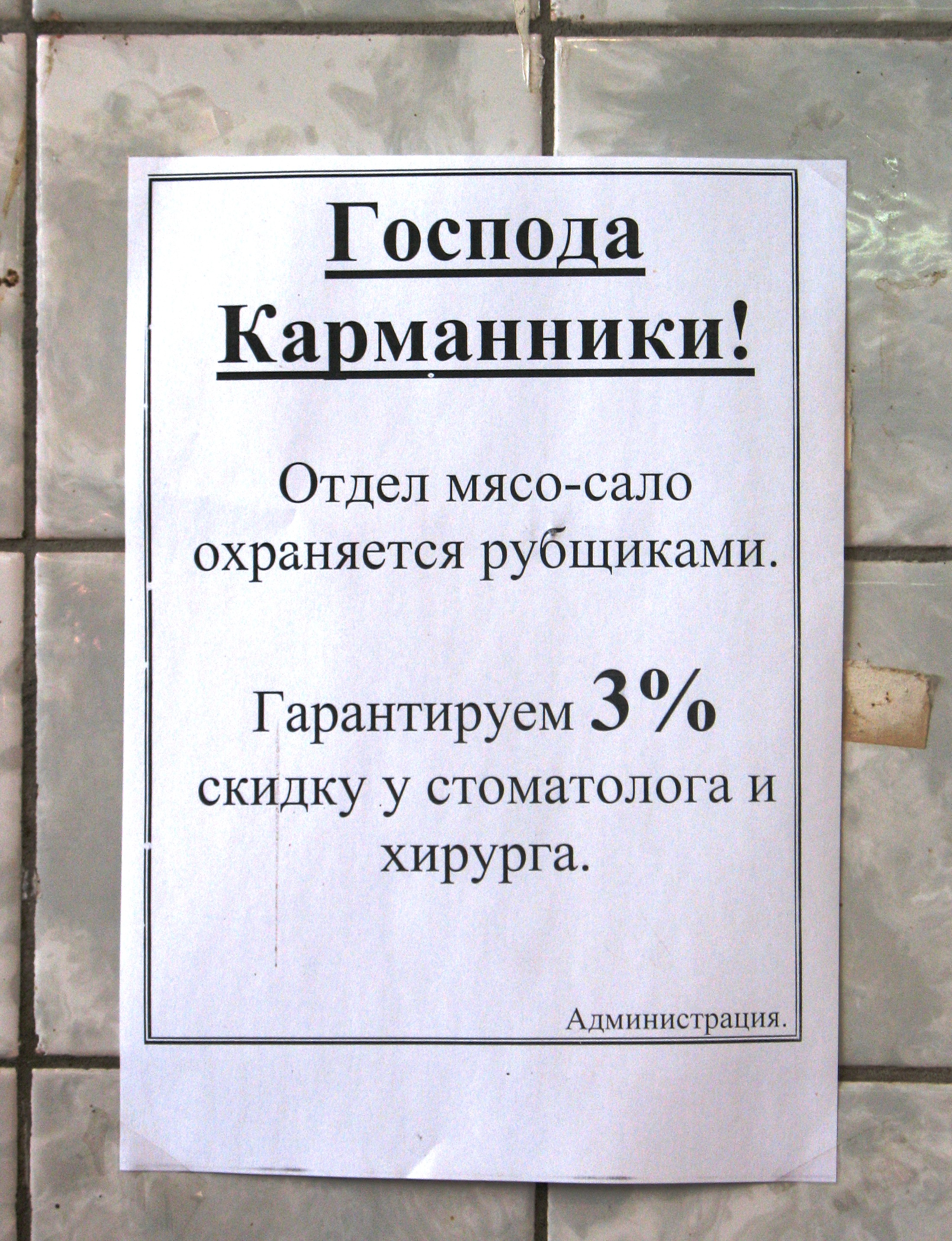 Объявление на Благовещенском базаре Харькова: "Господа карманники! Отдел "Мясо-сало" охраняется рубщиками [мяса]. Гарантируем трёхпроцентную скидку у стоматолога и хирурга." Объявление 2010 года. Об'ява